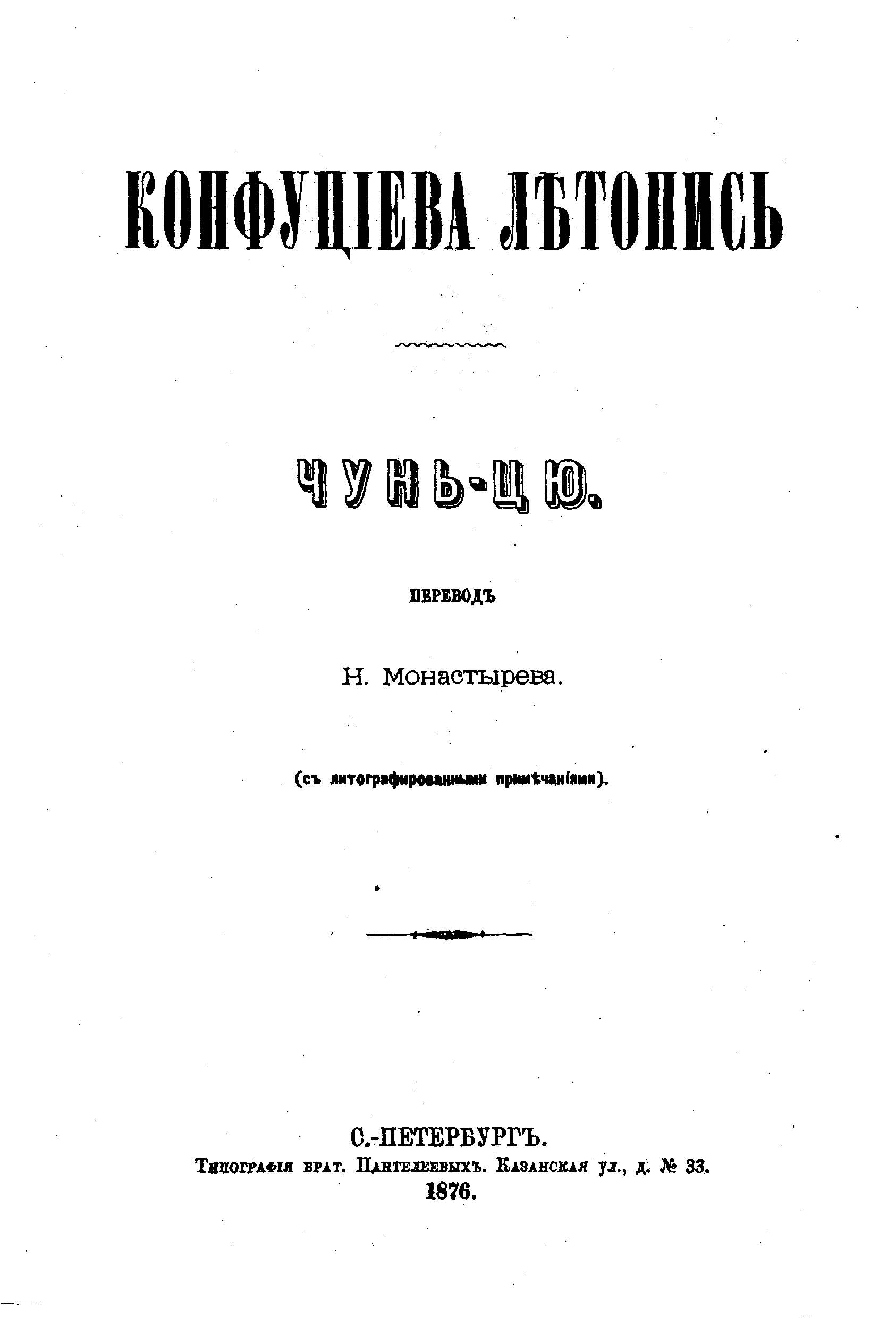 Титульный лист Чуньцю издания 1876 г. в переводе Монастырева Н. И.